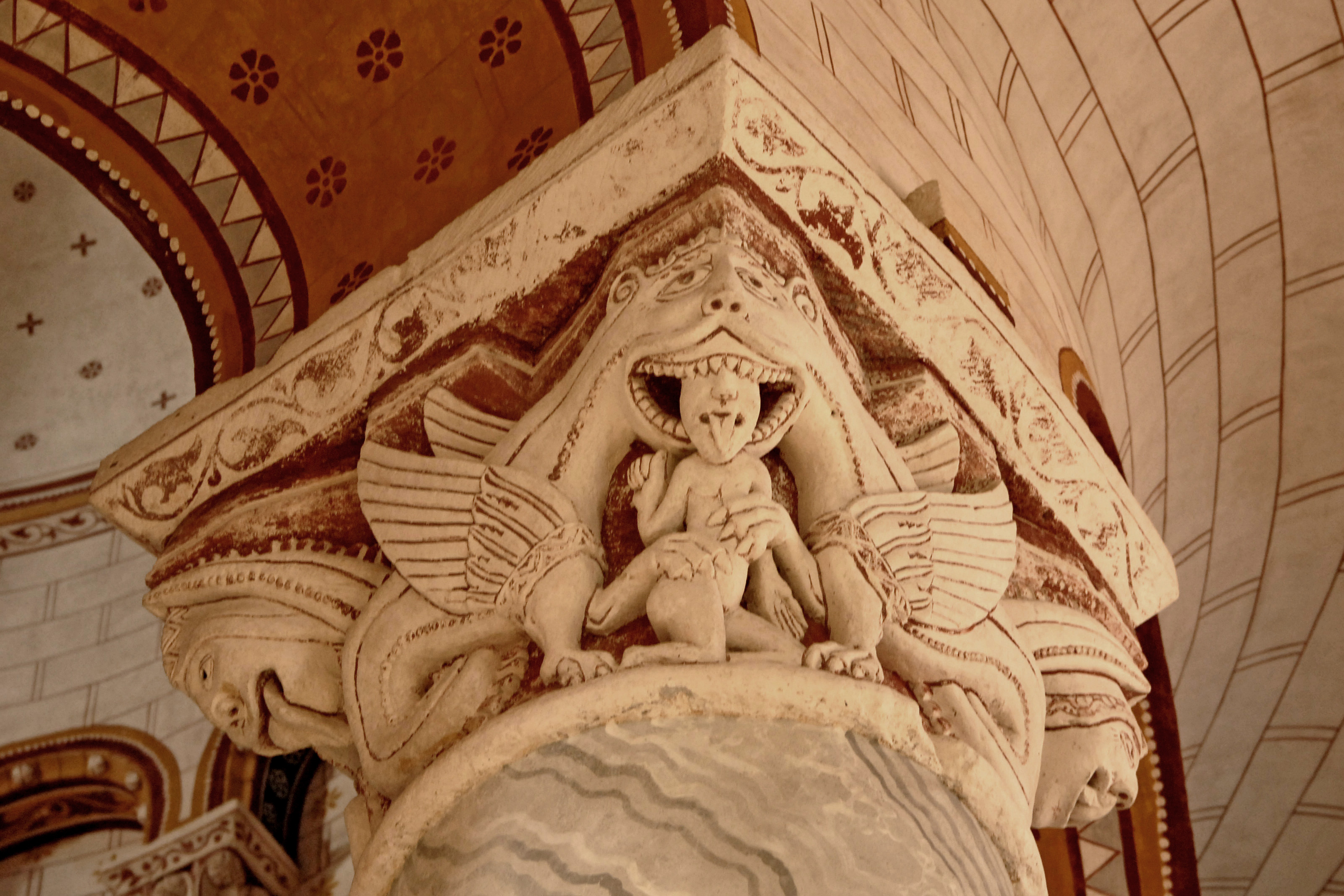 KAPITELL III